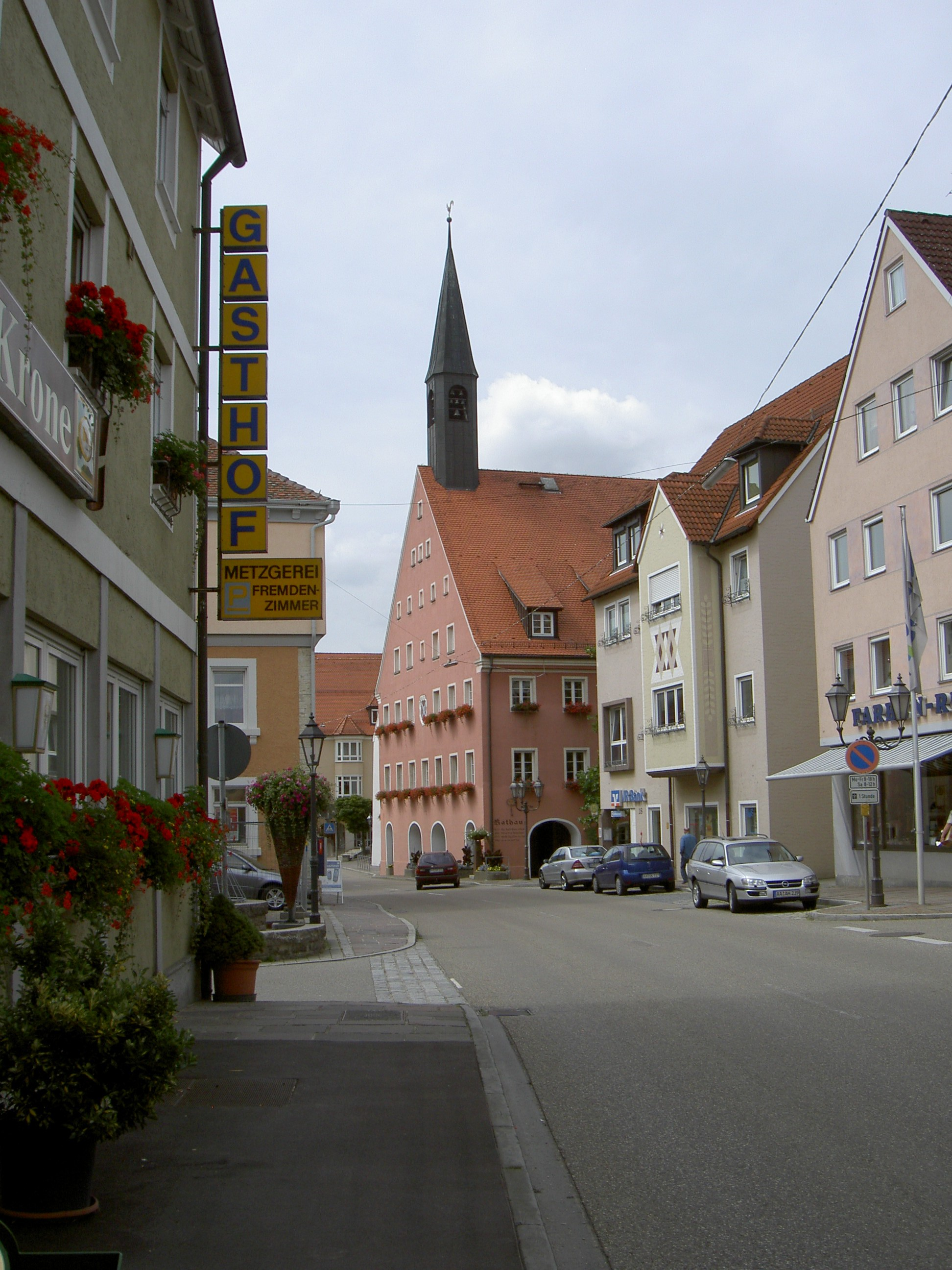 Neresheim Hauptstrasse mit Rathaus im Mittelpunkt